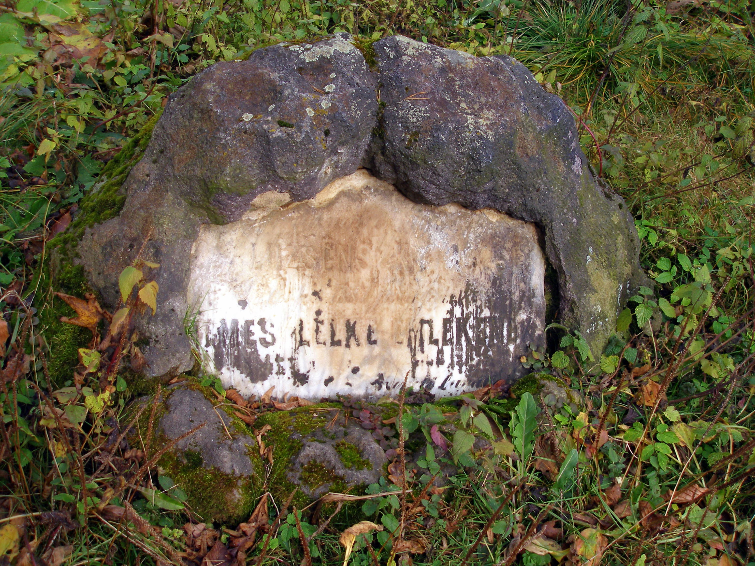 Lesopark nachádzajúci sa na juhozápadnom okraji mesta Prešov. Lesopark Cemjata - Zabíjaná. Pamätník, ktorý zaznamenal posledný súboj na tomto mieste pri ktorom 8.1.1881 zahynul barón Luzsenszky. Nápis je v maďarskom jazyku.